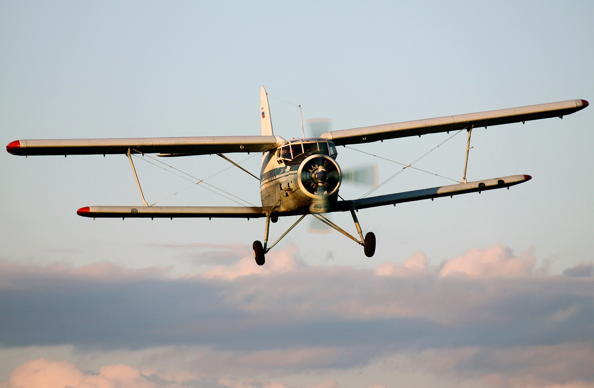 Antonov An-2T